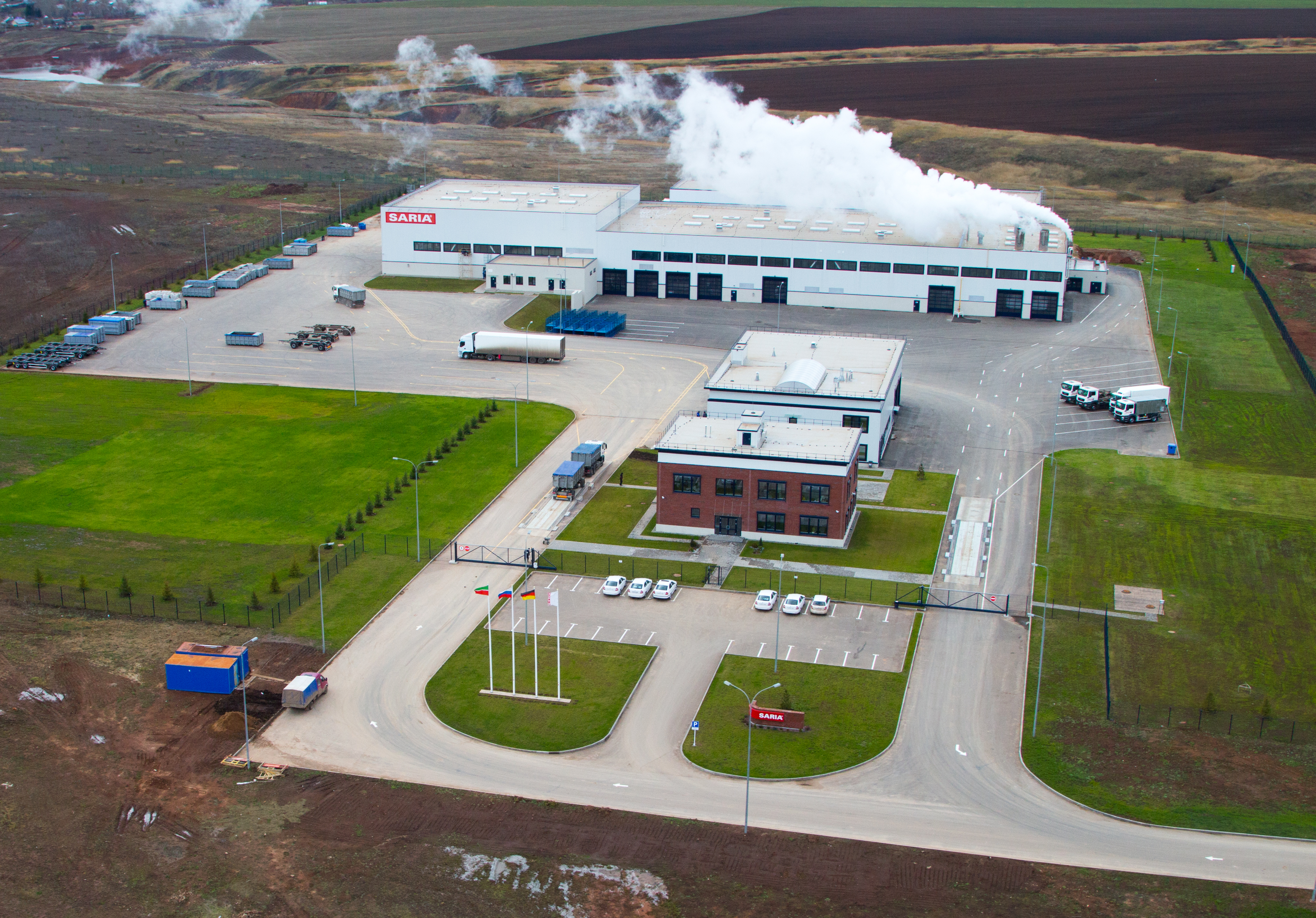 Особая экономическая зона «Алабуга», Завод «Сария Био-Индастрис Волга»